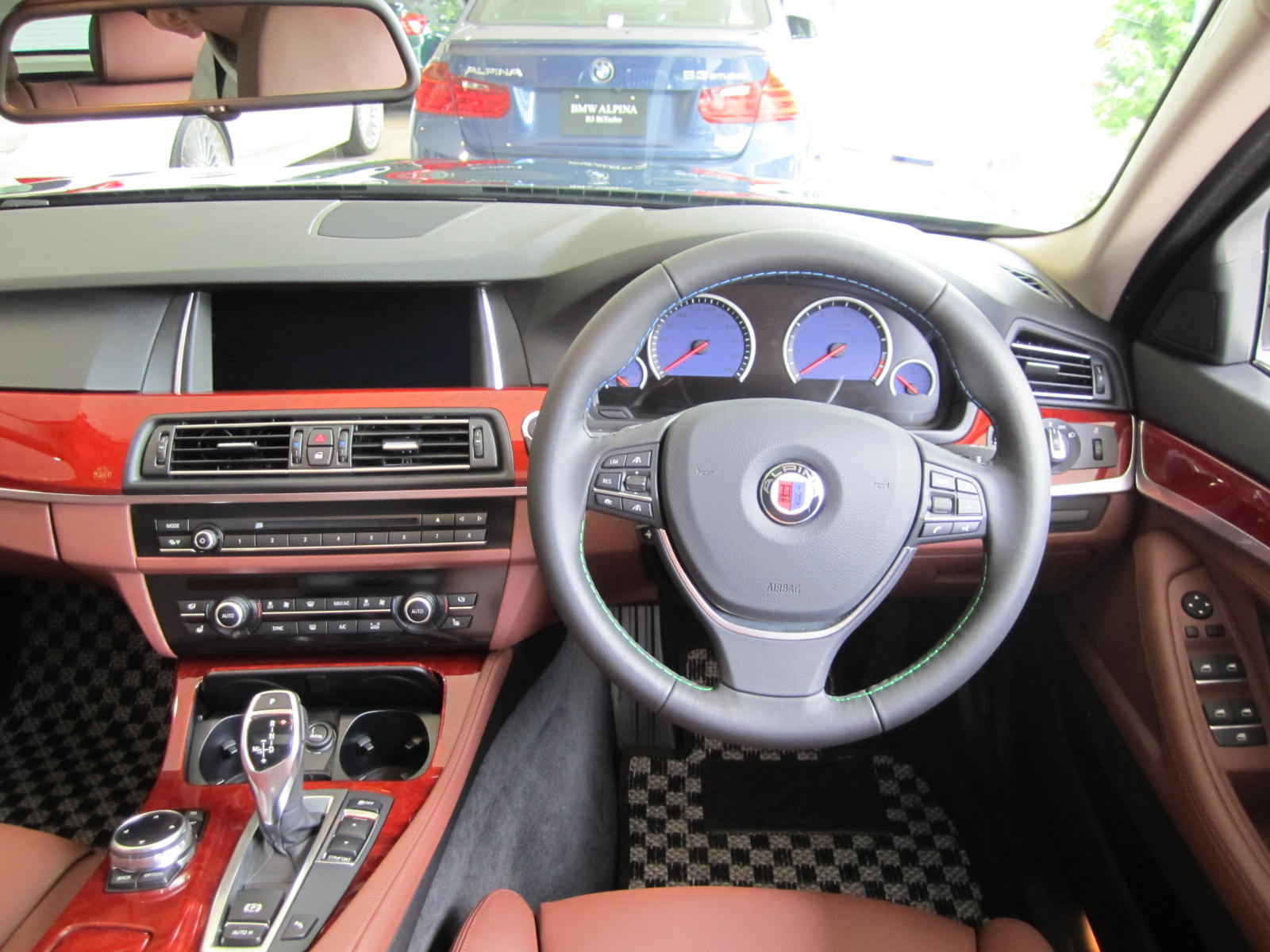 2013B5ツーリング内装LCI後